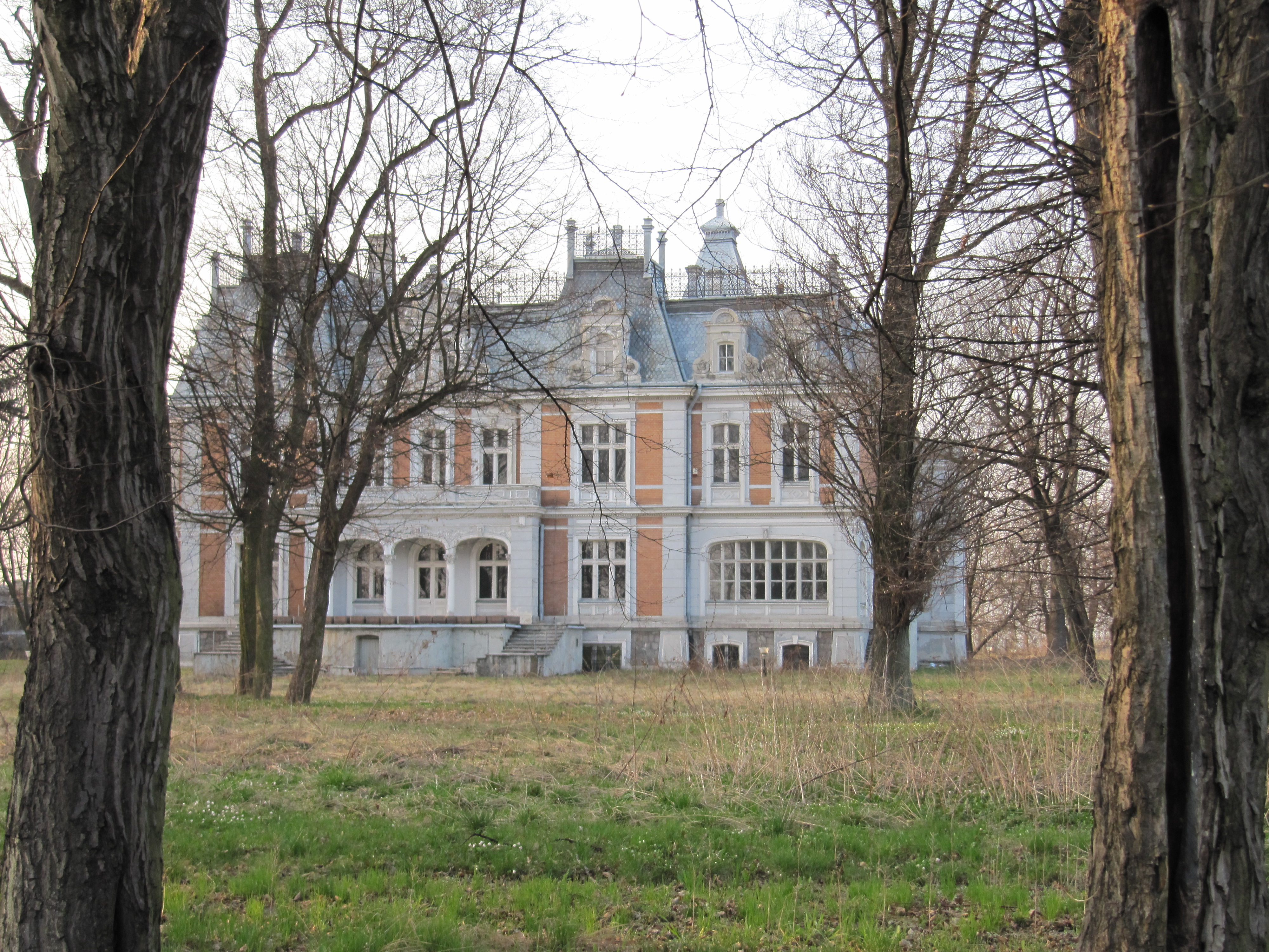 Pałac w Widzewie (Ksawerów)